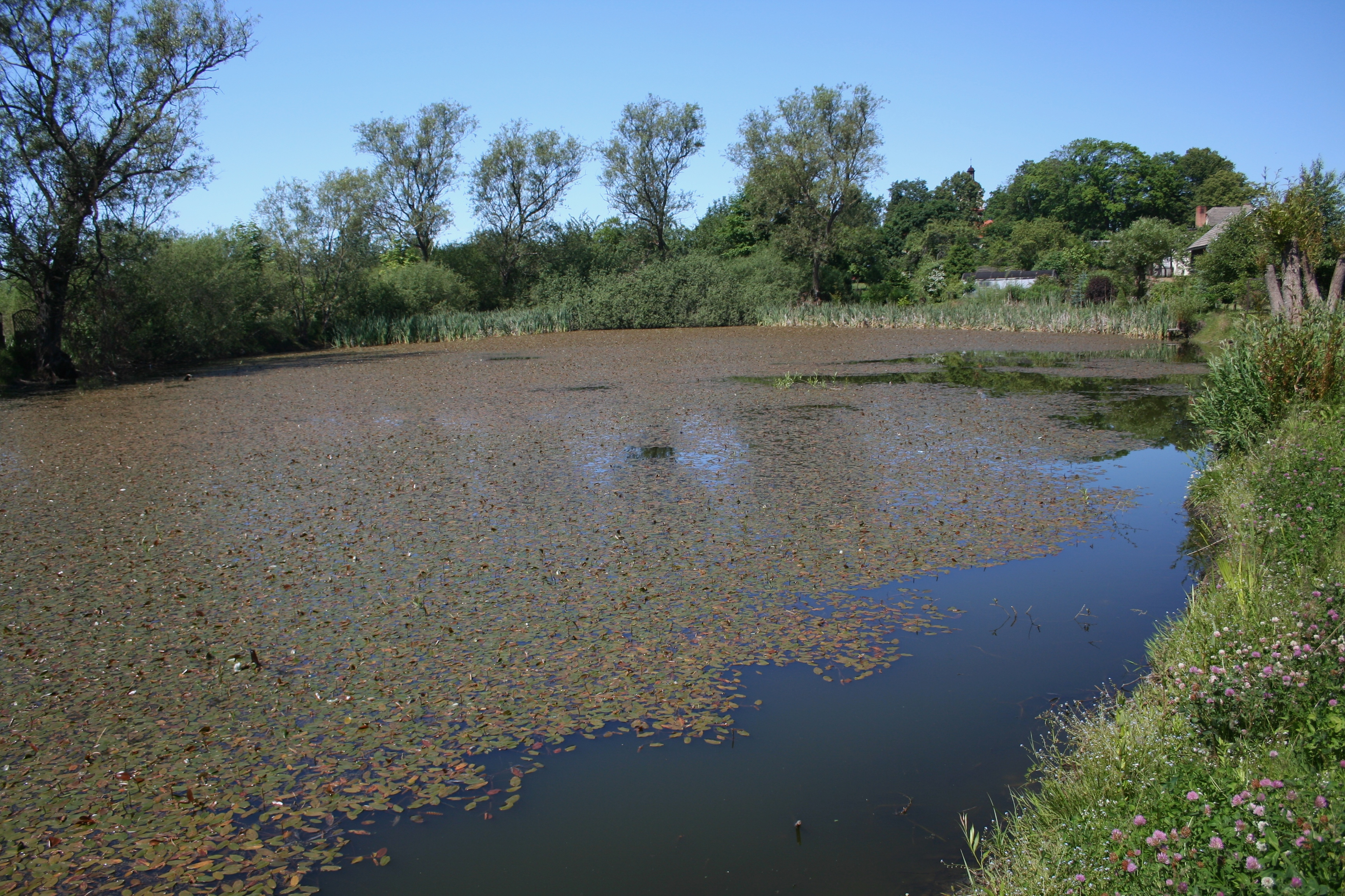 Stawek w Odrach, powiat chojnicki